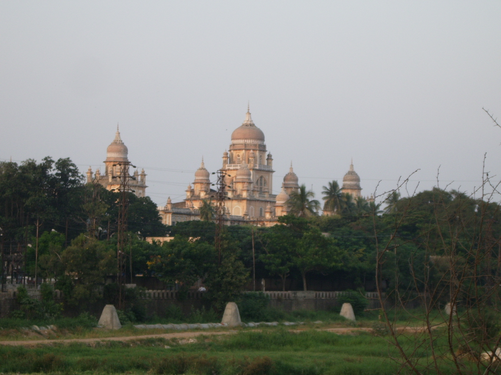 オスマニア市民病院